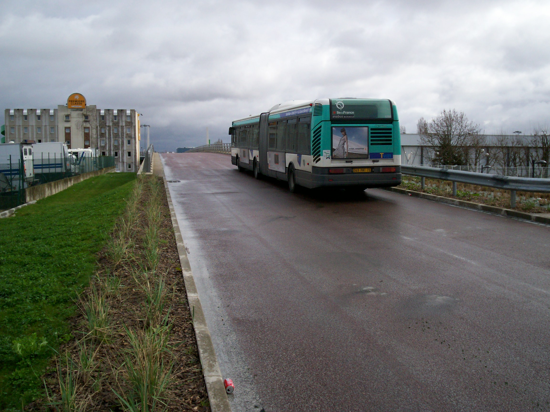 Bus TVM s'apprêtant à enjamber la A106 après quitté "Le Delta"